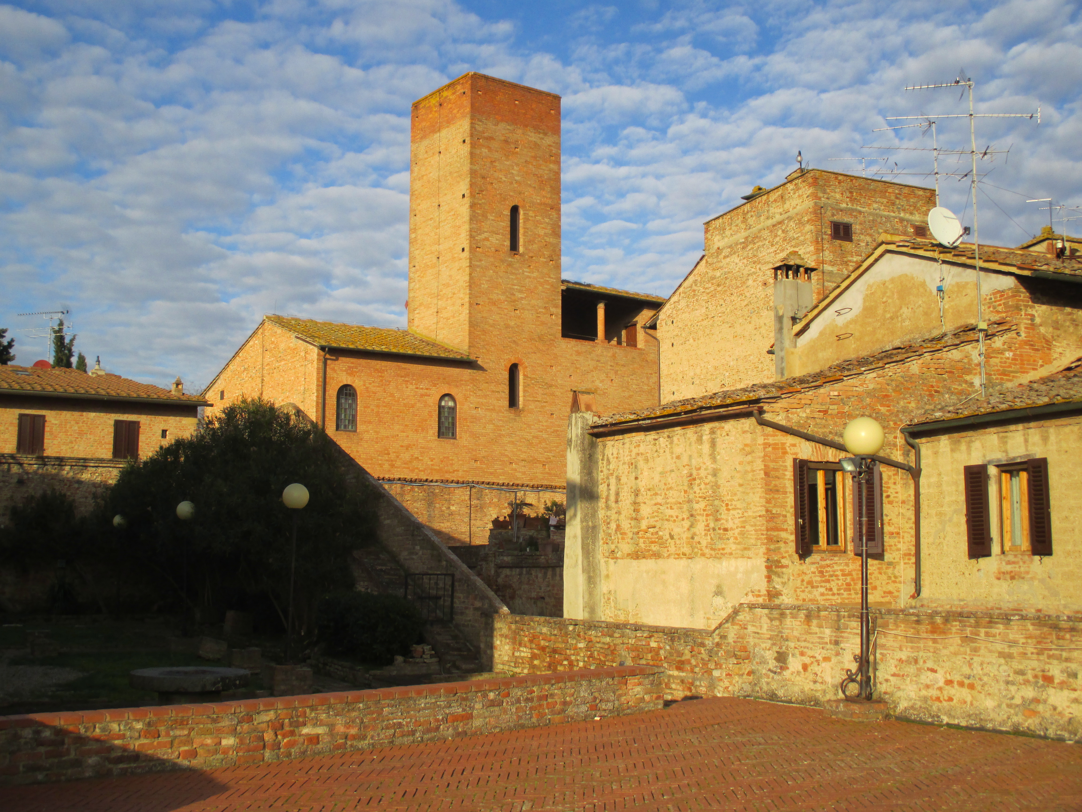 Certaldo: veduta verso la casa torre di Boccaccio.